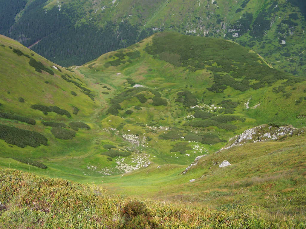 Dudowy Kocioł(Tatra Mountains, Dolina Starorobociańska)